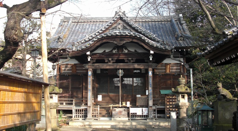 Takuzōsu (澤蔵司) in Bunkyō, Tokyo (東京都文京区)